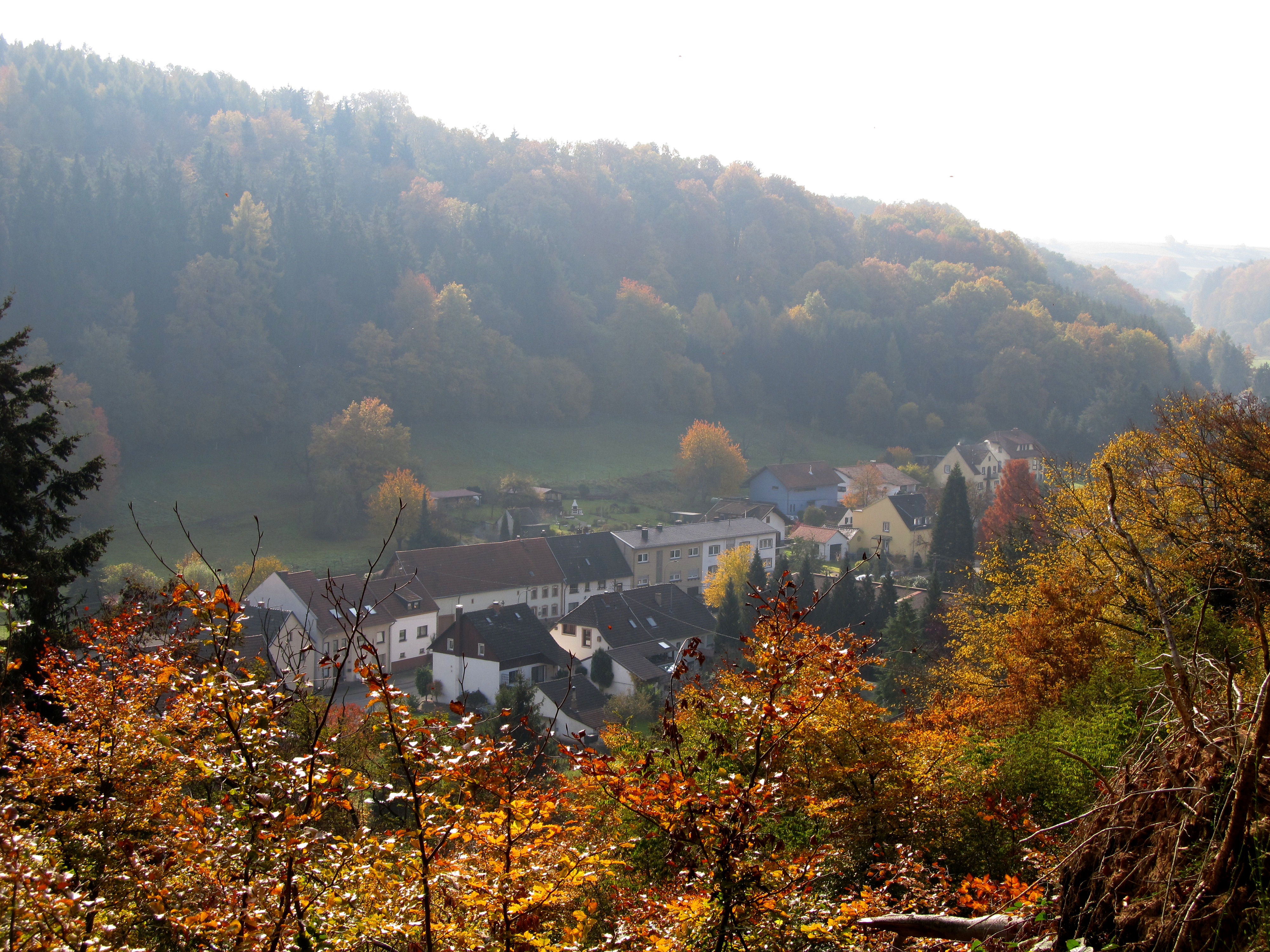 Blick auf Alschbach von der Mittagsweide